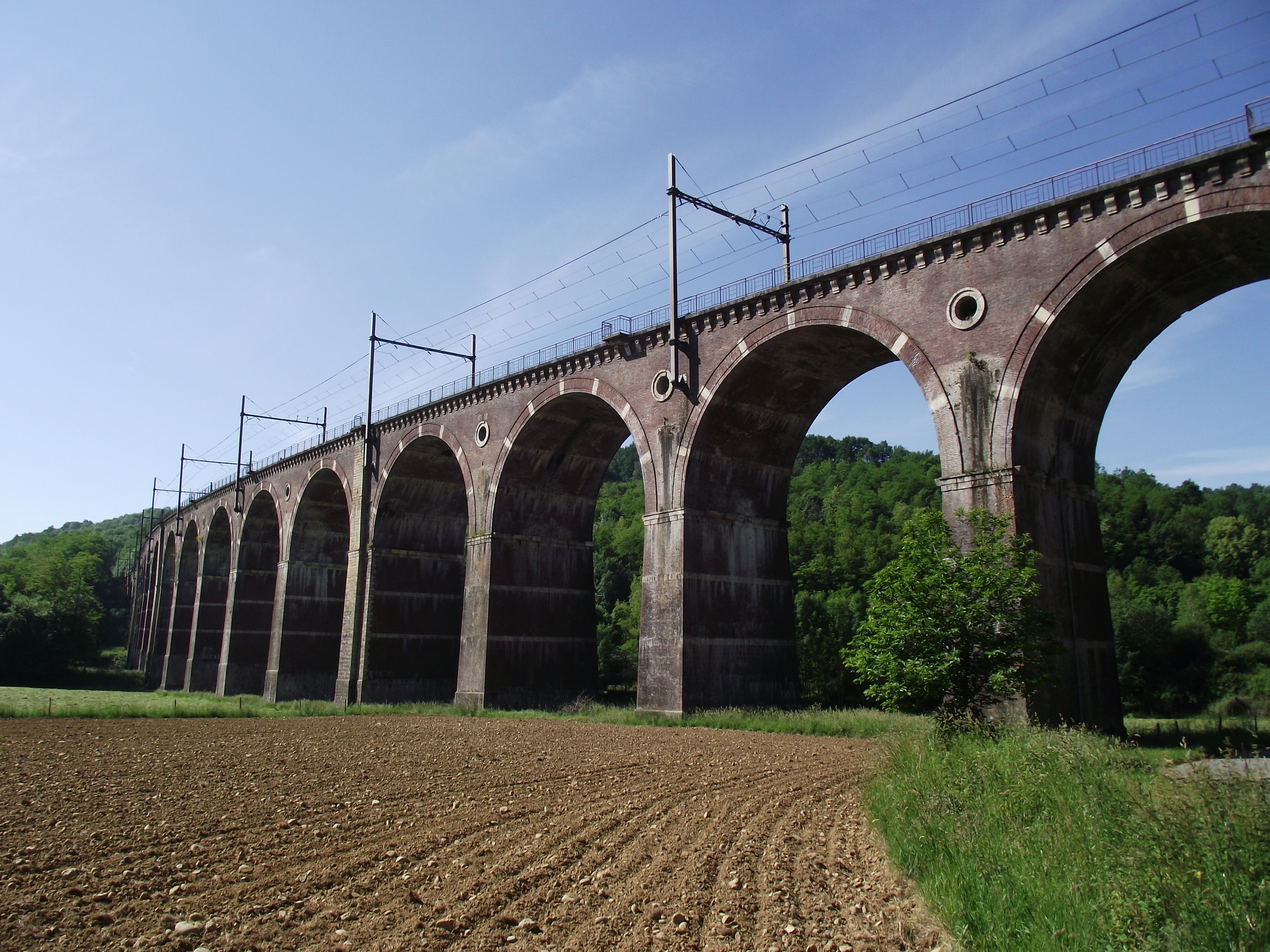 Viaduc de Lanespède (Hautes-Pyrénées, France)